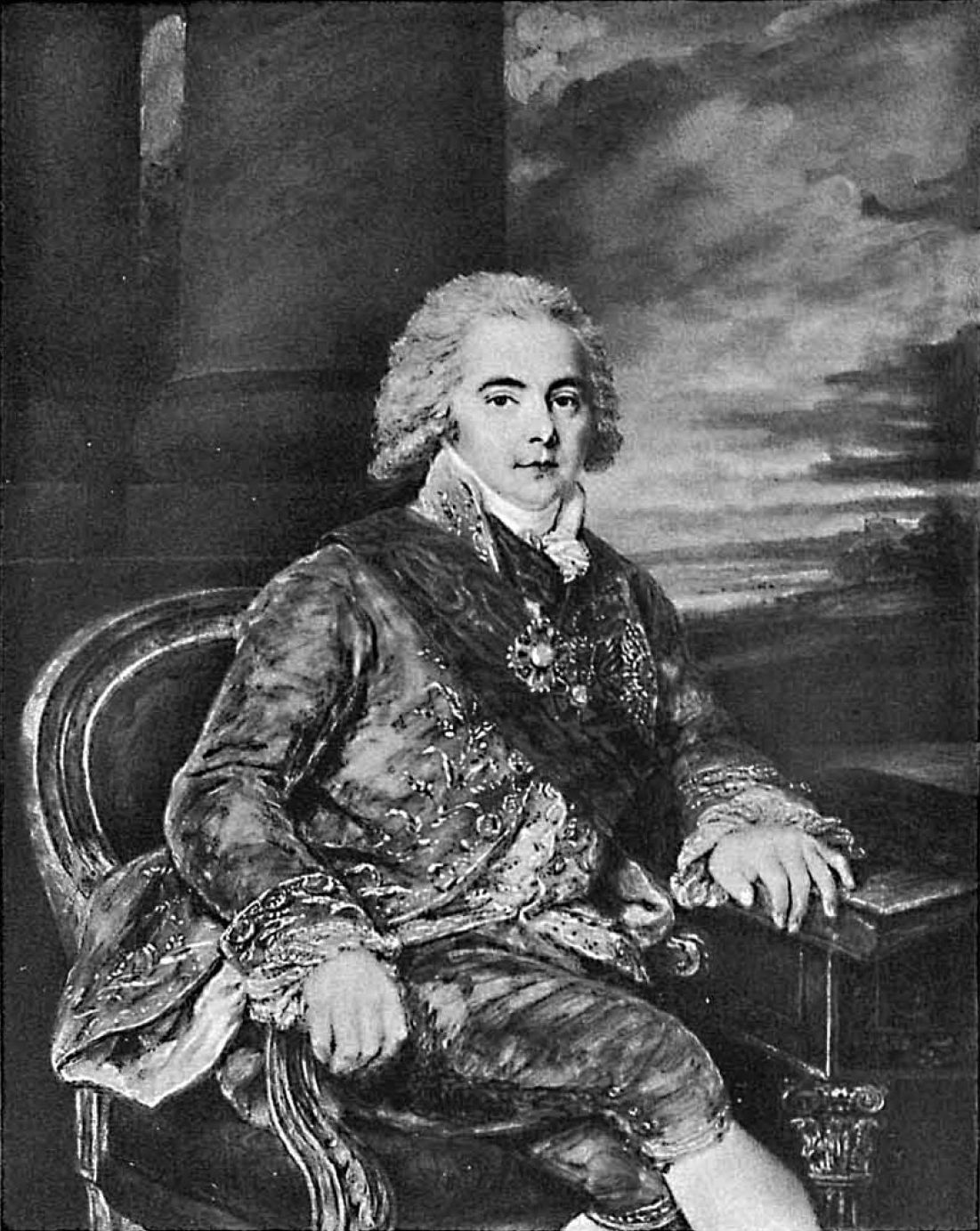 Князь Алексей Борисович Куракин (1759-1829)